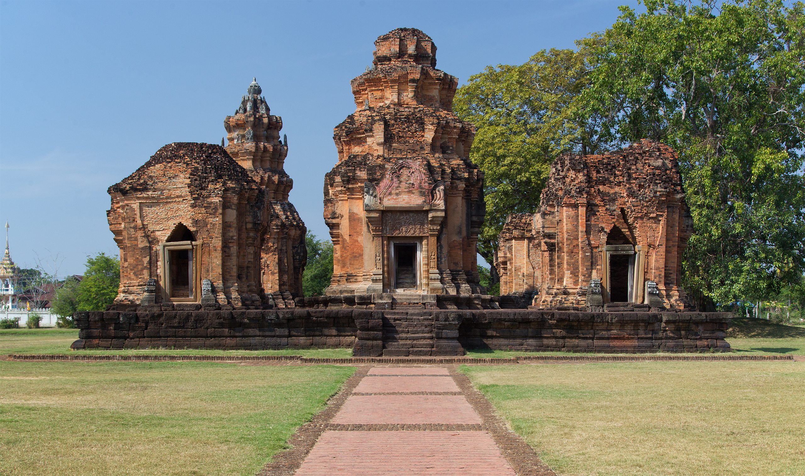 Prasat Sikhoraphum, Sikhoraphum, Surin, Thailand